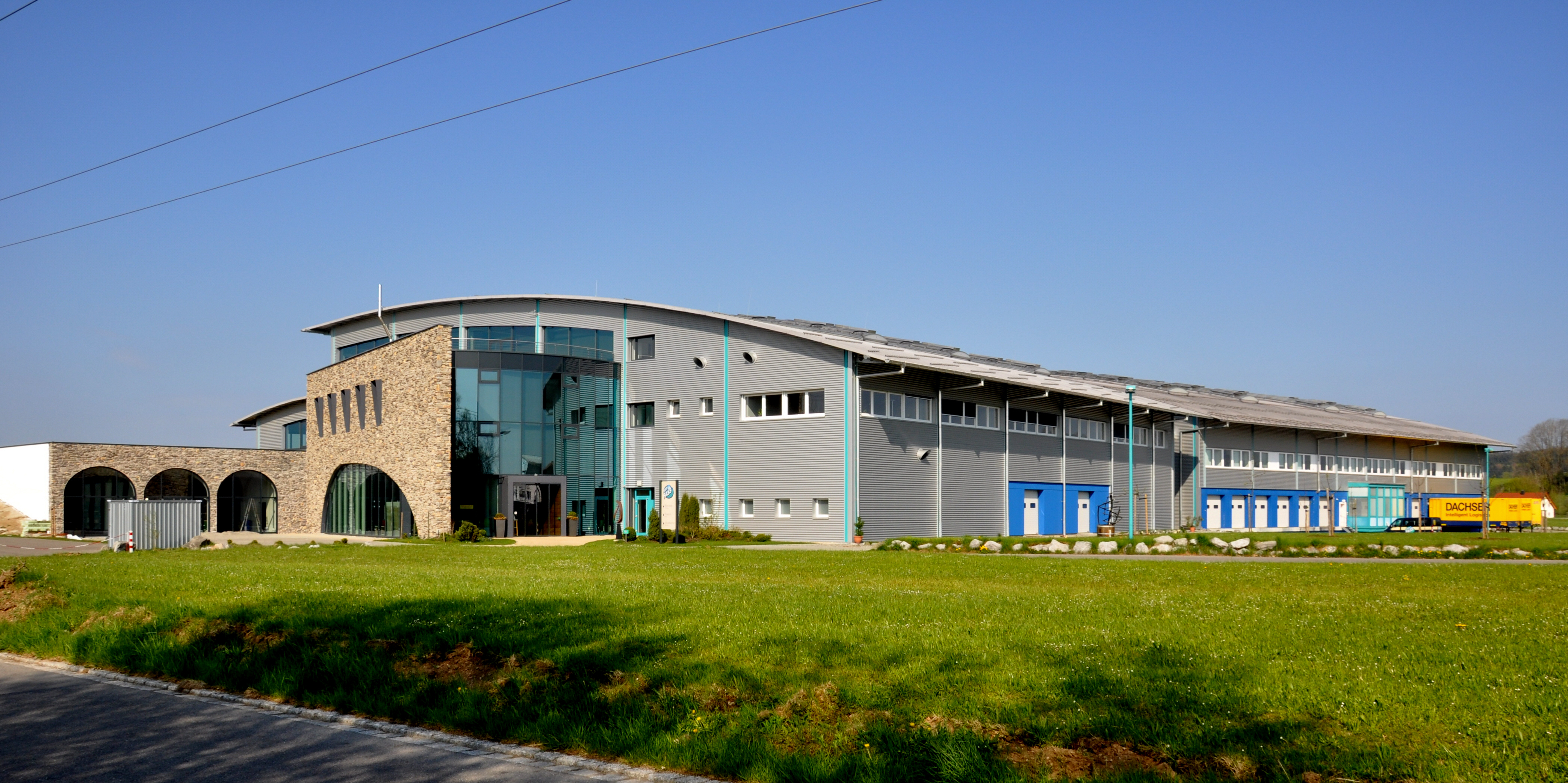 Zentrale der Vom Fass AG, Waldburg, Ortsteil Hannober, Landkreis Ravensburg